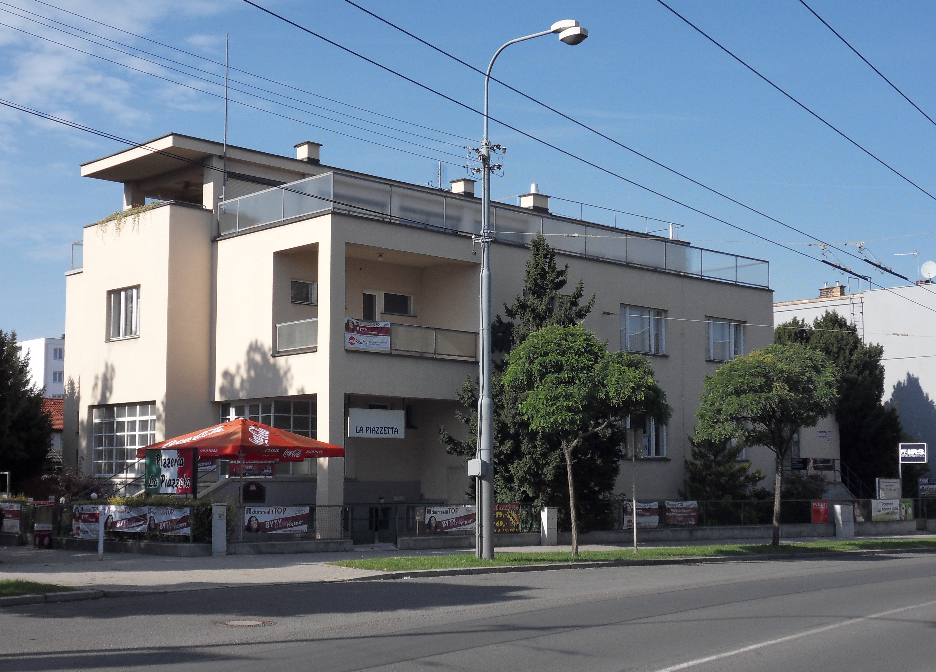 Vila Masarykova 854/102, Plzeň